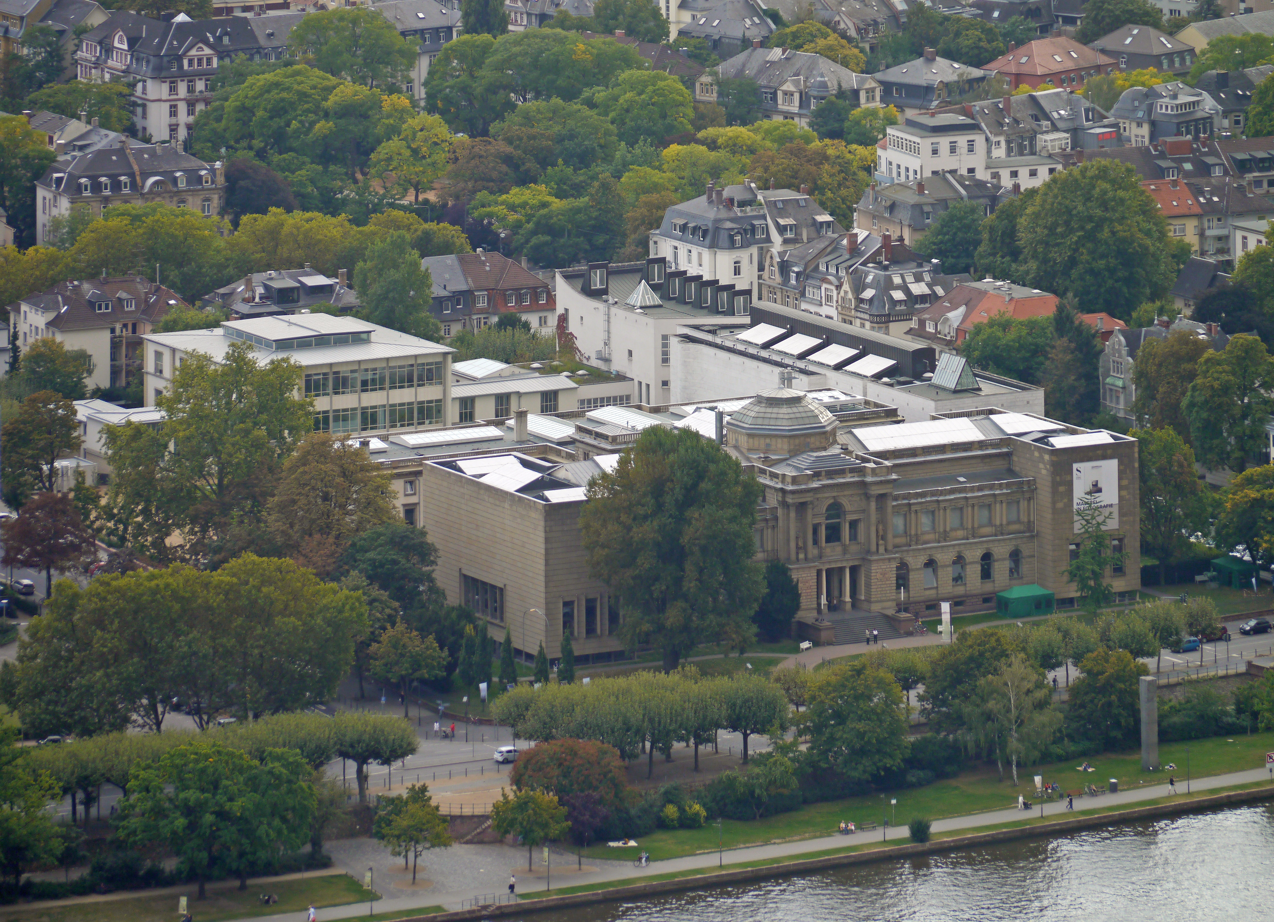 Das Staedel-Museum (2012) in Frankfurt am Main.